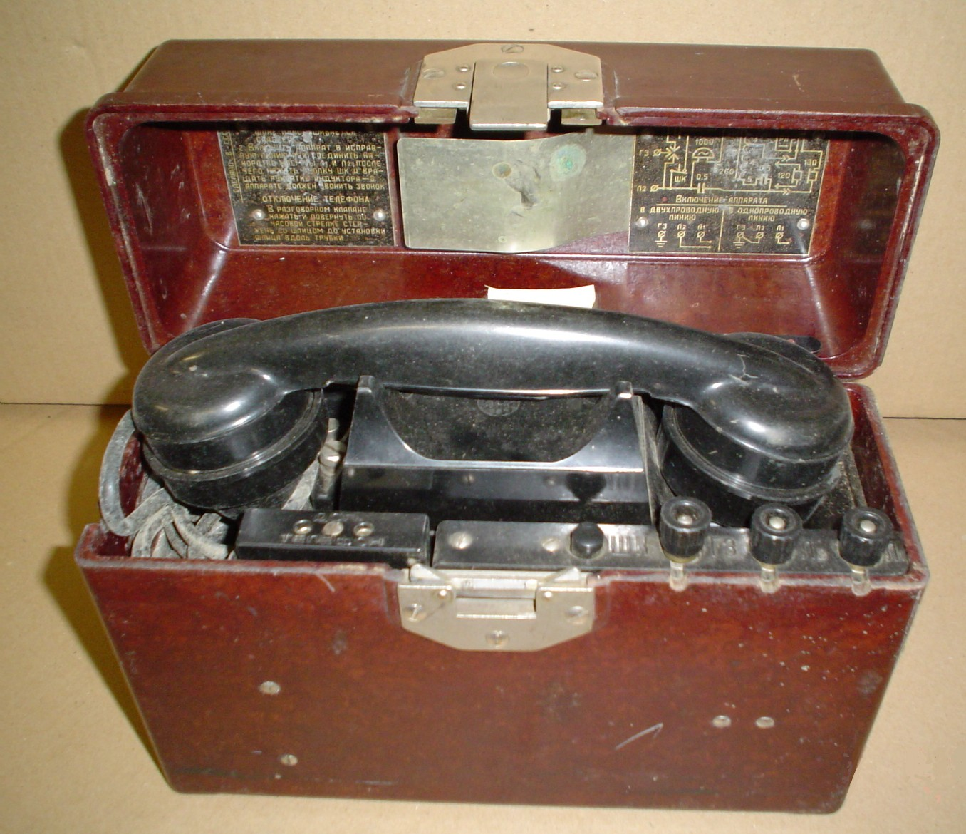 Bakelita kampa telefono.